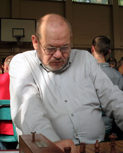 Jacek Bednarski, Lublin 2006